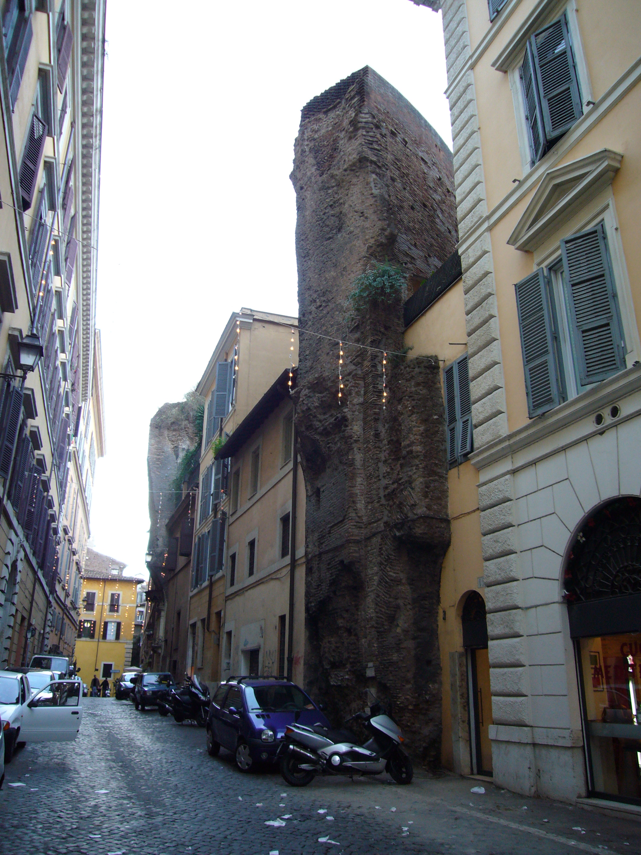 Roma, rione Pigna: Arco della Ciambella (resti delle Terme di Agrippa)